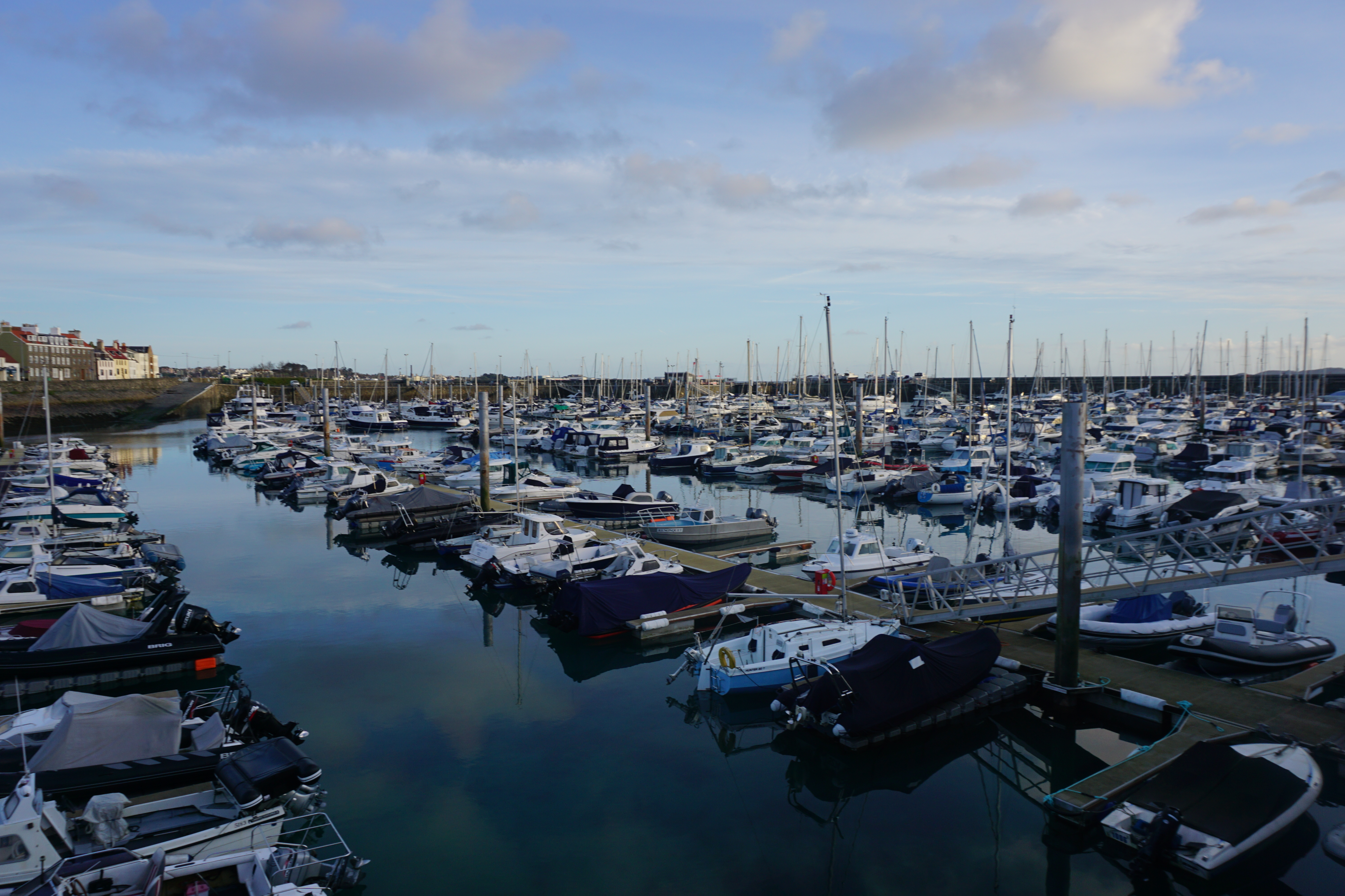 Slip K, St Julian's Pier, Guernsey